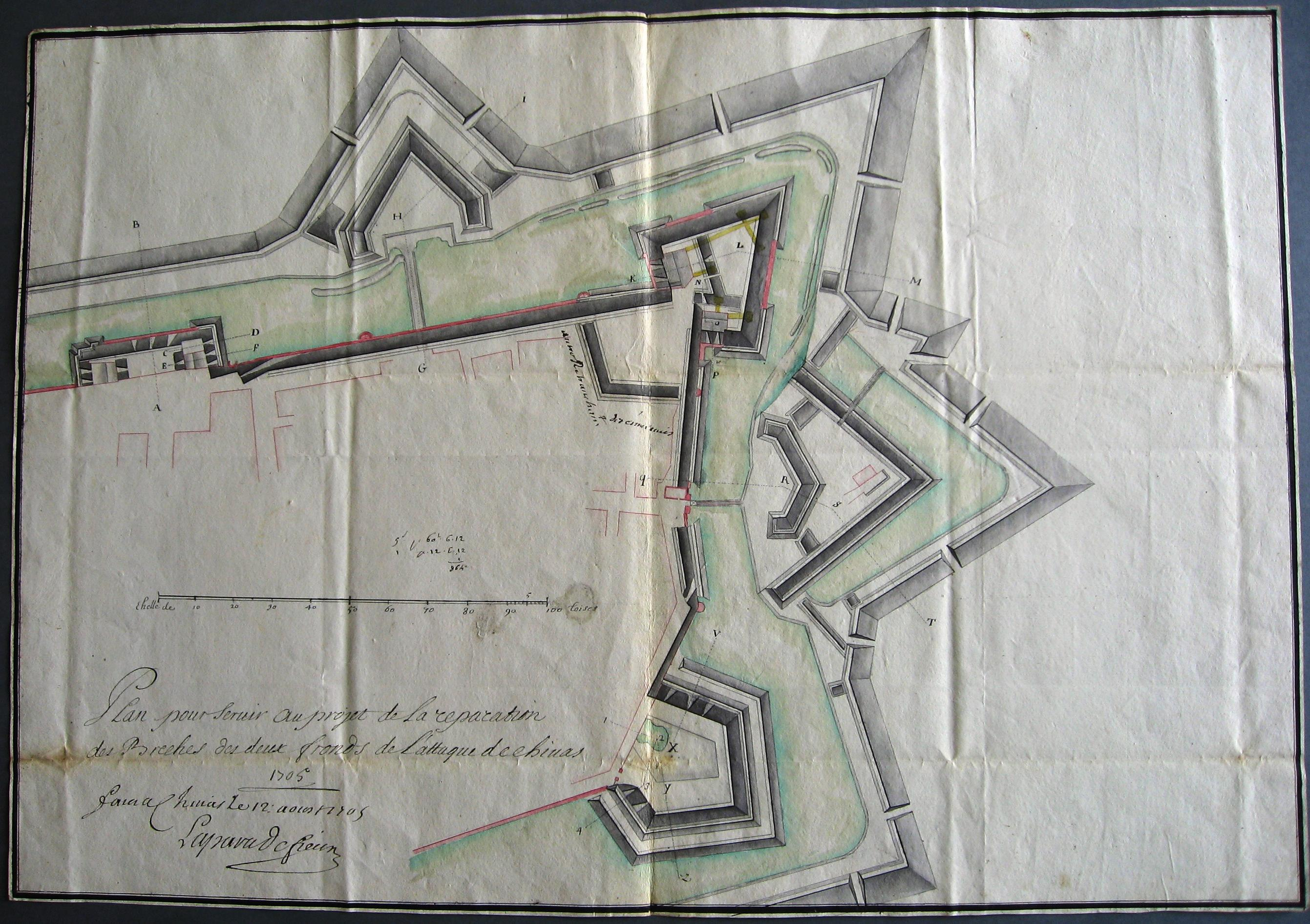 Plan pour servir au projet de la reparation des breches des deux fronts de l'attaque de Chivas. Fait a Chivas le 12 aout 1705